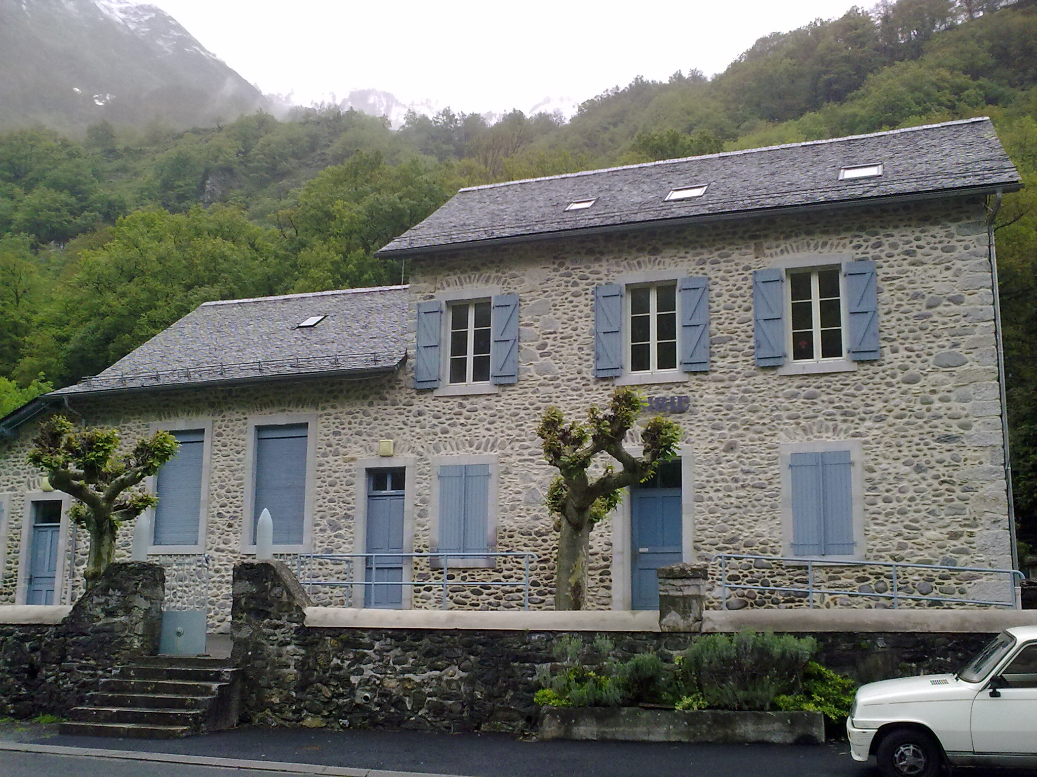 Cette-Eygun, France